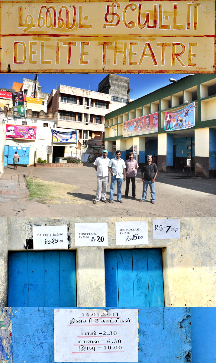 தென் இந்தியாவின் முதல் திரையரங்கான “வெரைட்டி ஹாலை” 1914-ல் கோயம்புத்தூரின் டவுன்ஹால் ரோட்டில் கட்டினார். இன்றும் இந்த திரையரங்கம் உள்ள சாலையானது வெரைட்டி ஹால் சாலை என்றே அழைக்கப்படுகிறது. திரையரங்கின் உரிமையாளர்மா றியுள்ளதால்இன்று இந்த திரையரங்கானது “டிலைட் திரையரங்கம்” என அழைக்கப்படுகிறது.